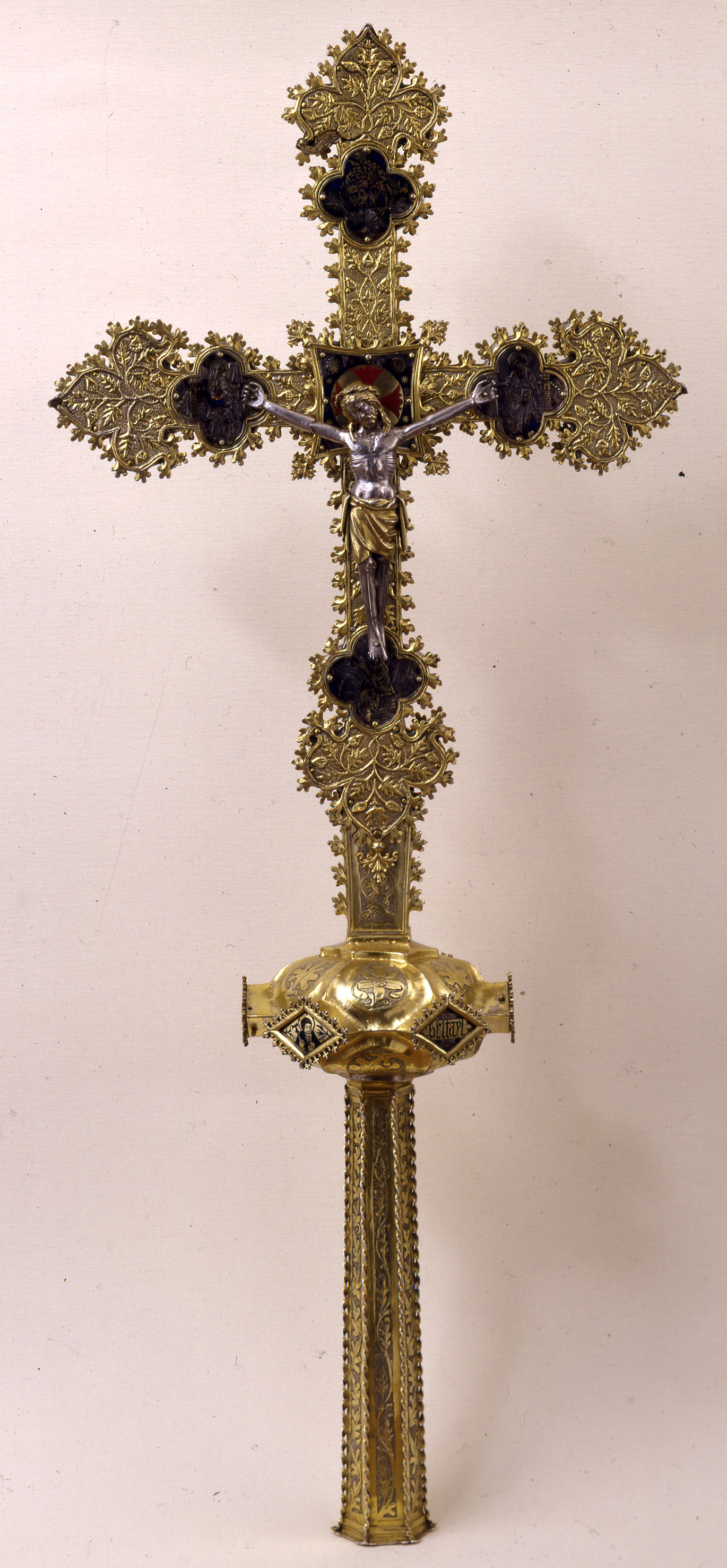 Glorieta (Conca de Barberà), creu processional gòtica de la parroquia de Glorieta, actualment al Museu Diocesà de Tarragona.